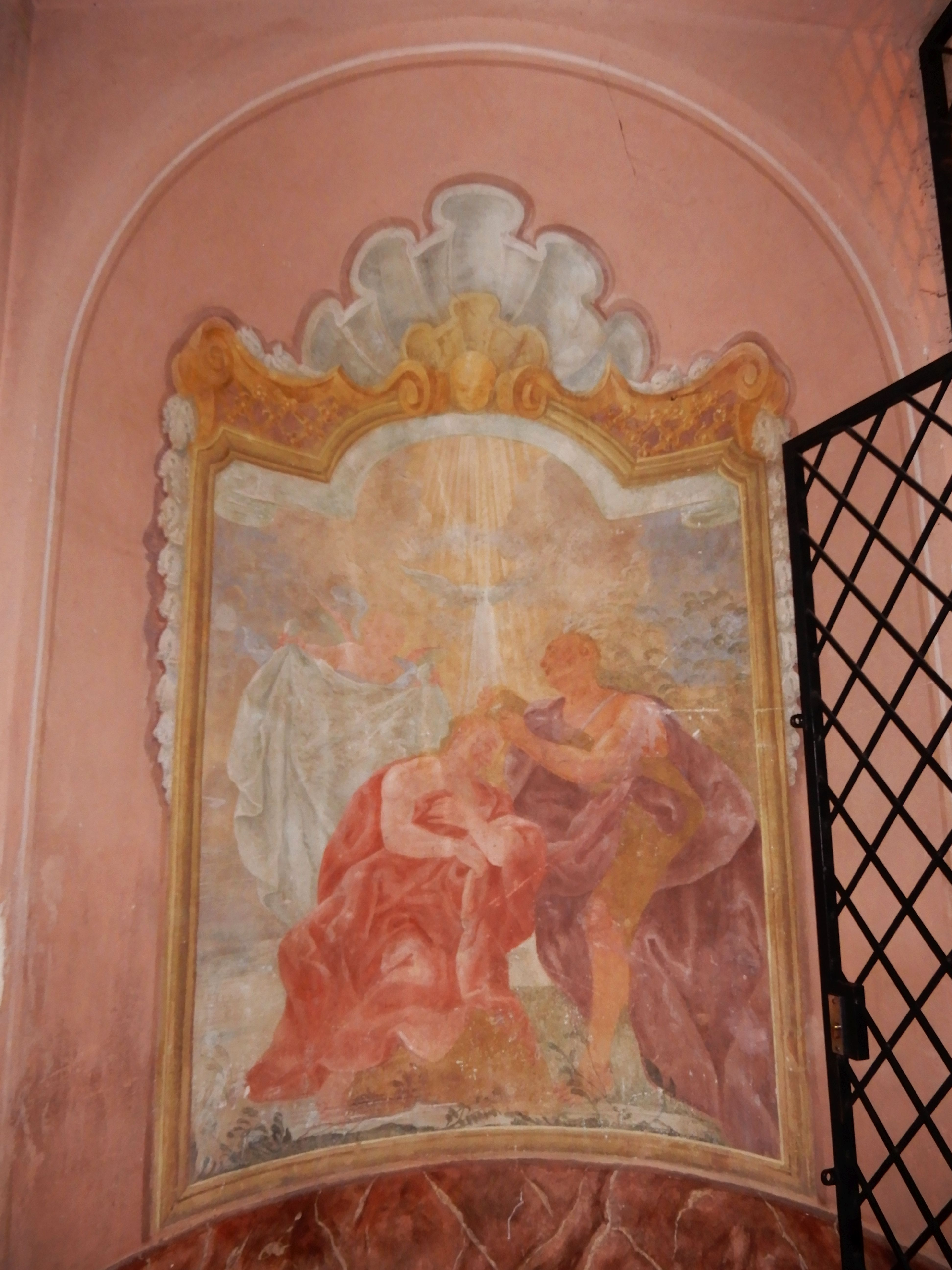 Kunratice (Praha), kostel sv. Jakuba Většího, Křest Krista, nástěnná malba v předsíni